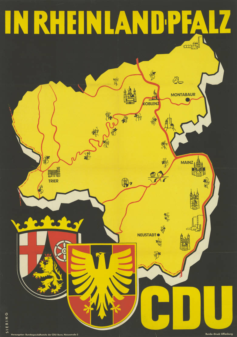 In Rheinland-Pfalz CDU Abbildung: Landkarte mit Städten und Flussläufen, Landeswappen und CDU-Signet (Grafik) Plakatart: Motiv-/Textplakat Künstler_Grafiker: Siering Auftraggeber: Bundesgeschäftsstelle der CDU-Bonn Drucker_Druckart_Druckort: Burda-Druck, Offenburg Objekt-Signatur: 10-010 : 203 Bestand: Landtagswahlplakate Rheinland-Pfalz (10-010) GliederungBestand10-18: Landtagswahlplakate Rheinland-Pfalz (10-010) » CDU Lizenz: KAS/ACDP 10-010 : 203 CC-BY-SA 3.0 DE